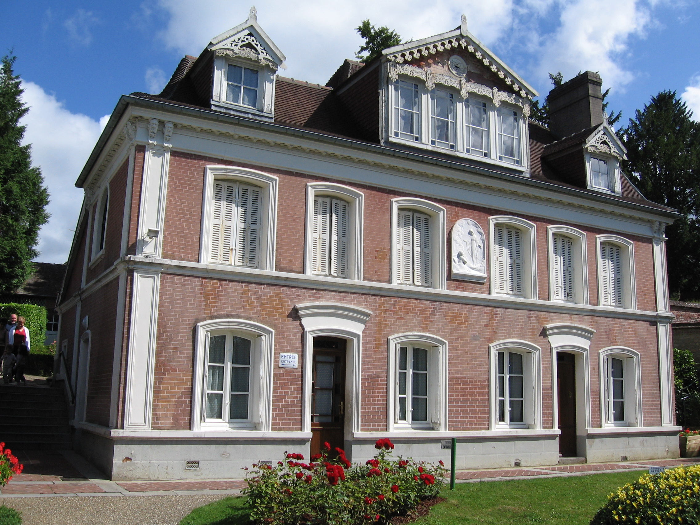 Maison familiale des Martin (Lisieux) où Sainte Thérèse passa son enfance. La visite de la maison s'organise sous la forme d'un parcours, en groupe, sous la surveillance des religieuses de la congrégation des oblates de Sainte-Thérèse. Ce parcours prévoit des stations dans les différentes pièces de la maison, stations minutées grâce à la diffusion, par des enceintes, d'un commentaire sonore enregistré.